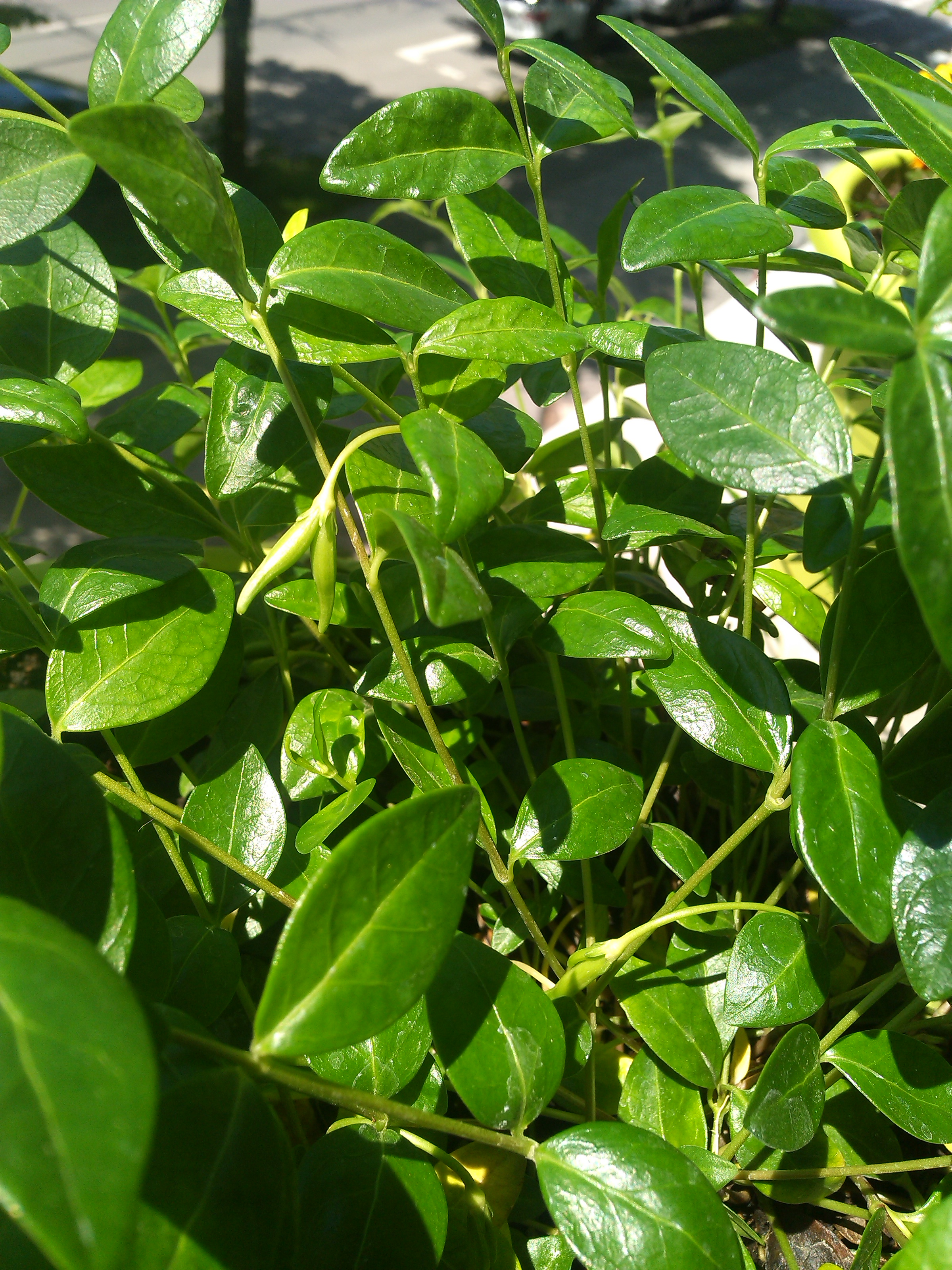 Fruchtstand Vinca minor, München, 2017